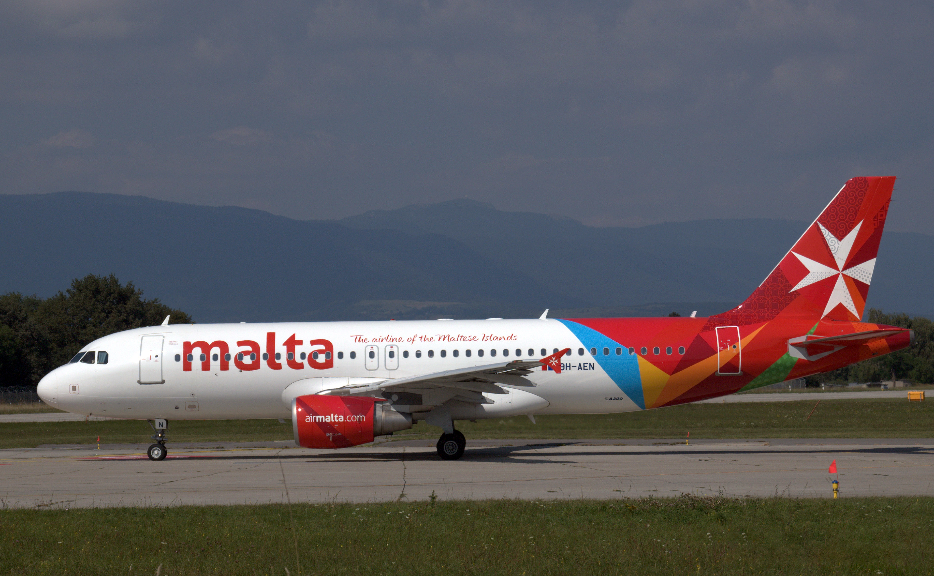 GVA 31.08.2013